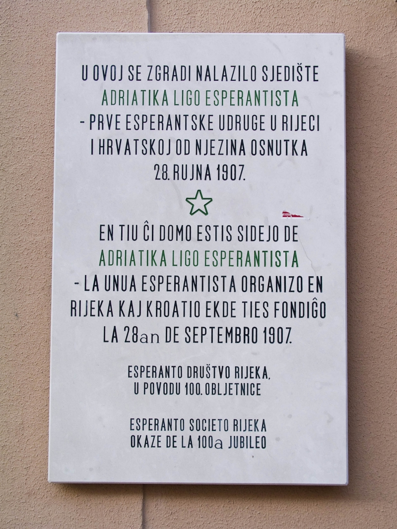 Spomen ploča na spomen osnivanja Esperantske udruge u Rijeci i Hrvatskoj